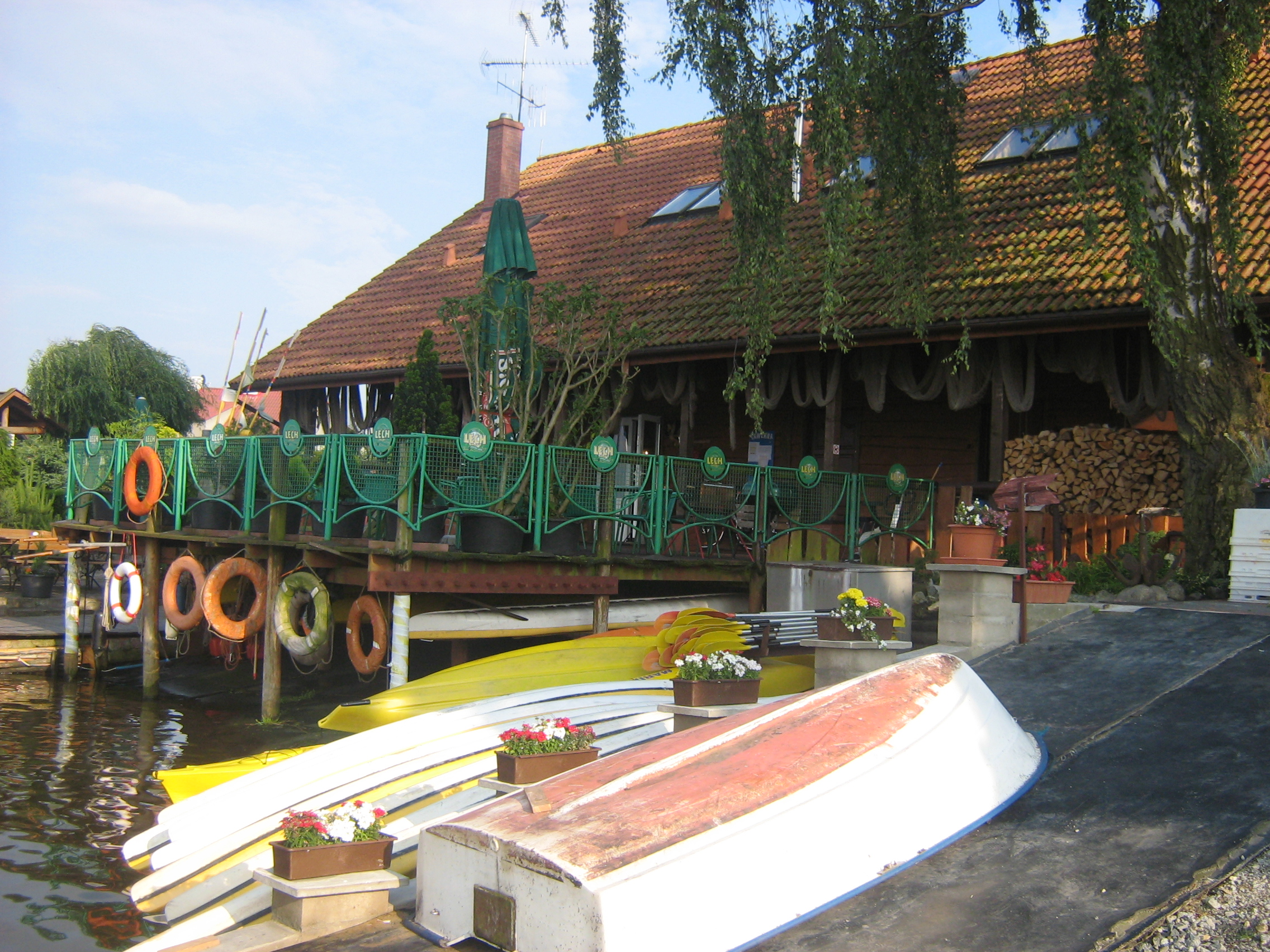 Marina w Karsiborze